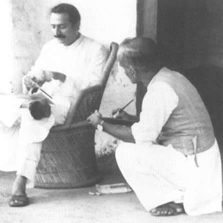 Meher Baba in 1936